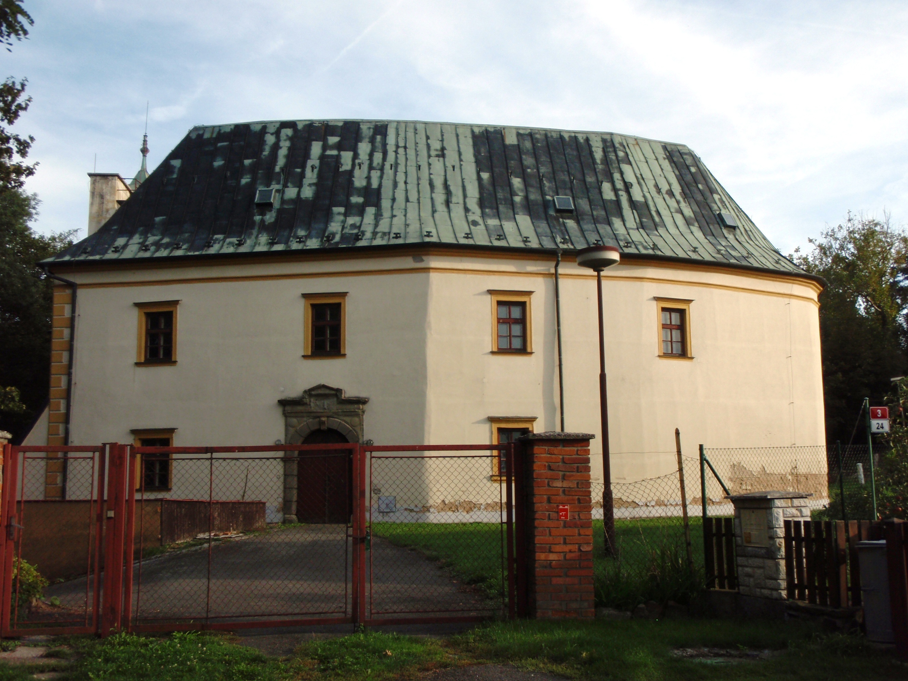 Zámek Čekyně, Zámecká 1/26, Čekyně